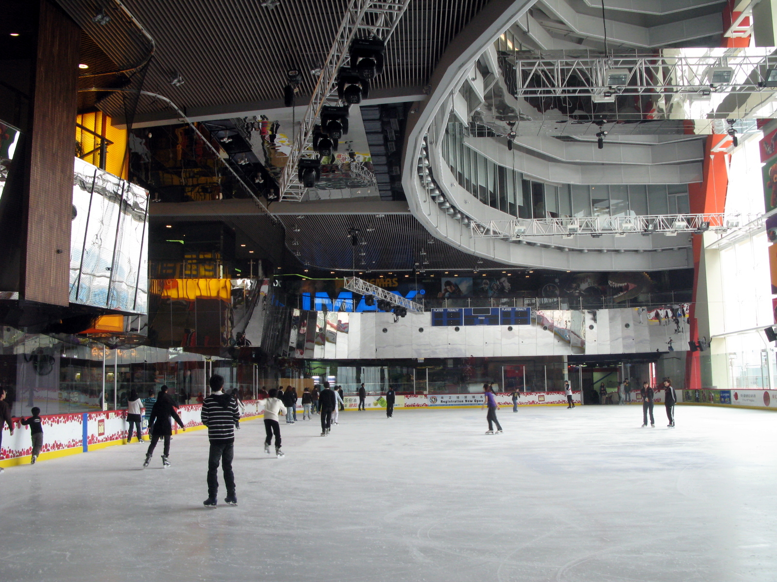 HK MegaBox MegaICE view